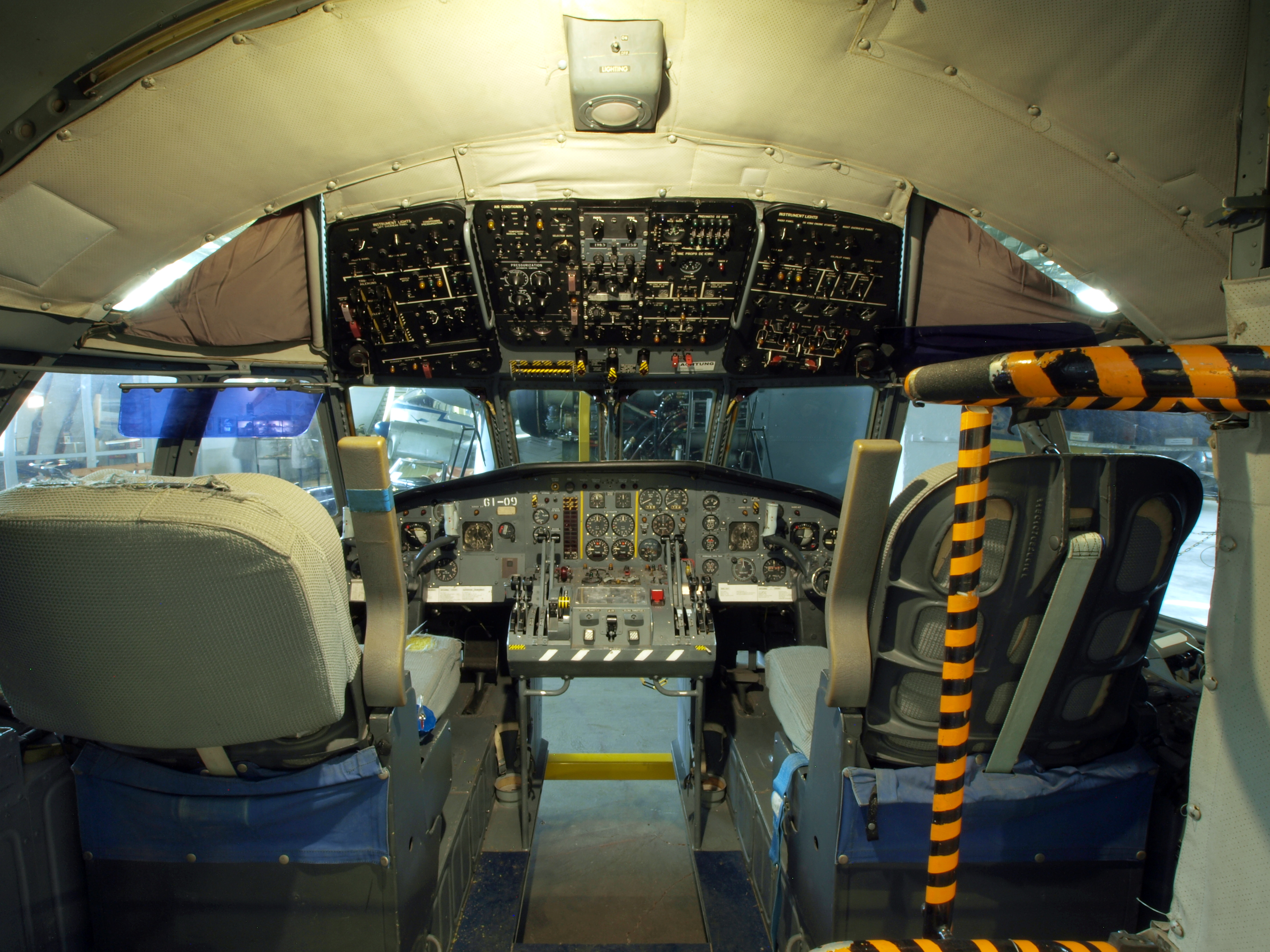 Breguet Atlantique cockpit